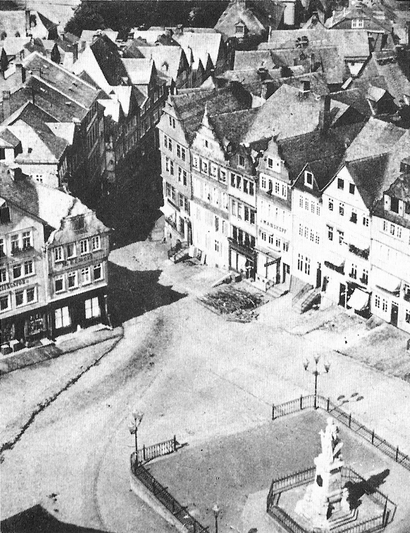 Altstadt von Siegen/Westfalen: Die nordwestliche Ecke des Marktplatzes mit „Germania“-Denkmal (rechts unten) und Einmündung der Kölner Straße (Bildmitte). Anonymes Foto aus dem Jahr 1890, aufgenommen vom Turm der Nikolaikirche.